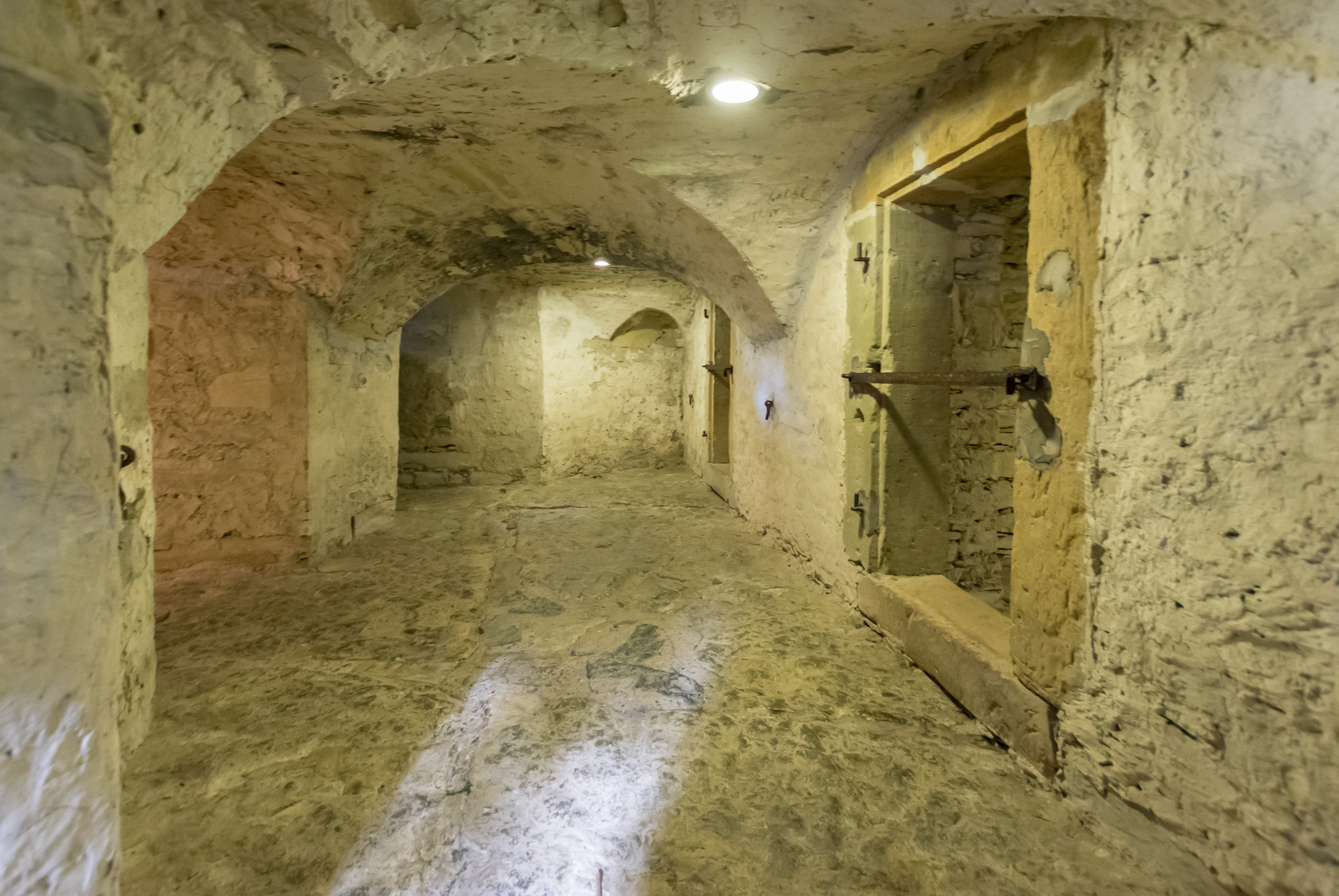 Wewelsburg in Büren-Wewelsburg; Burgverlies